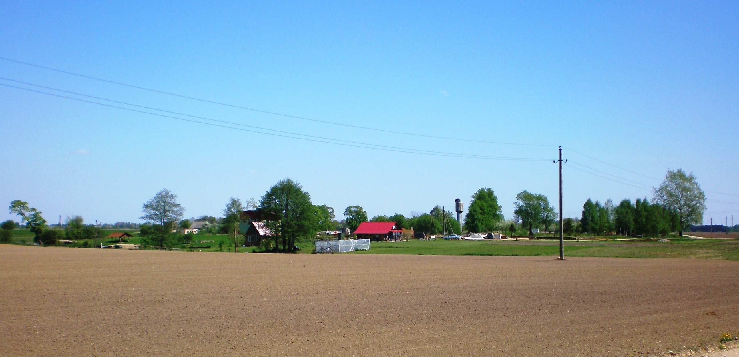 Bubliai, Kėdainių raj.